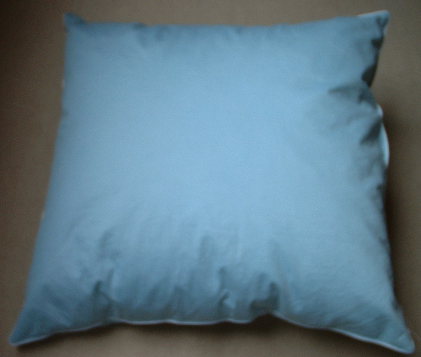 Sypek plněný pravým peřím